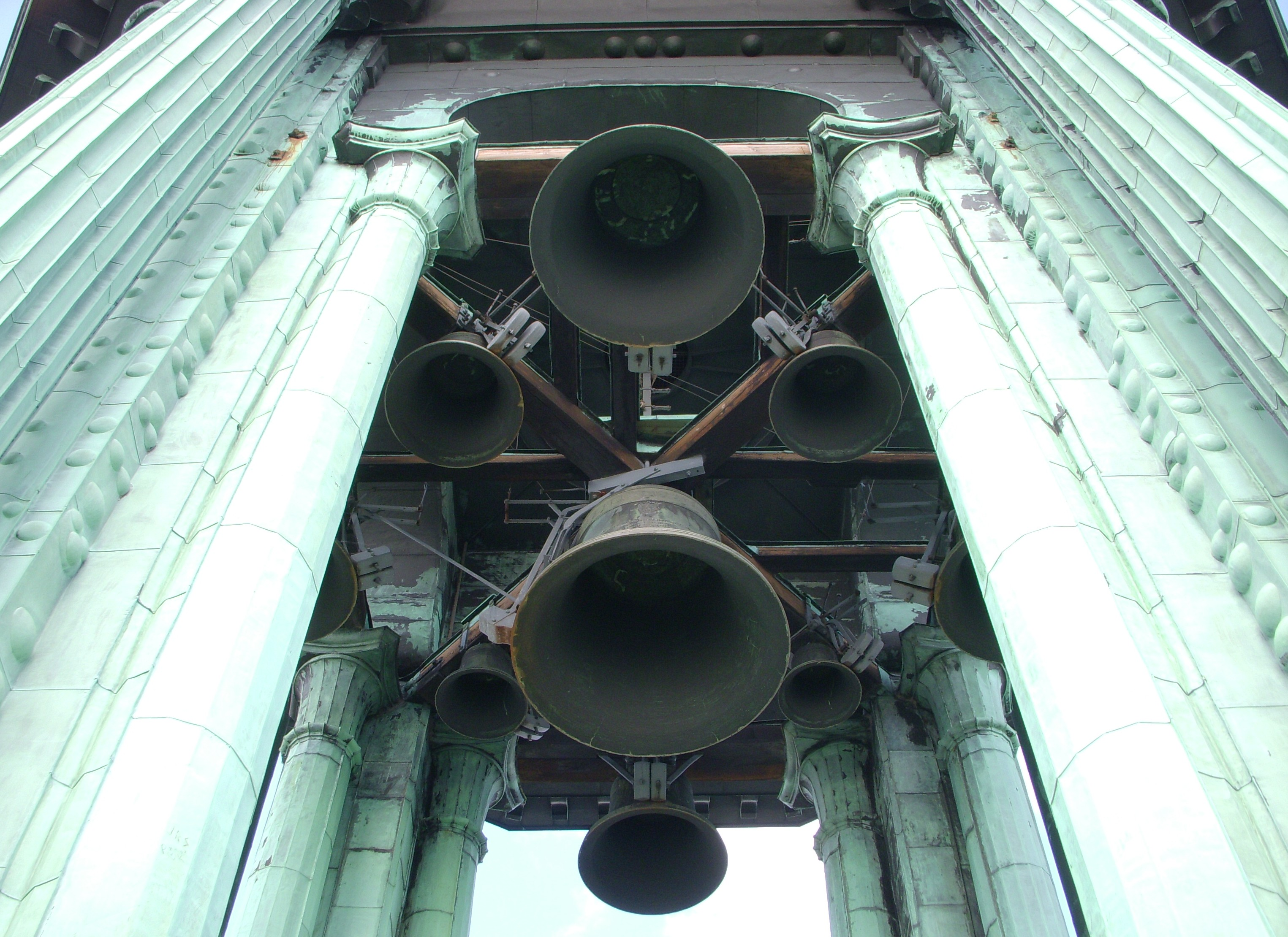 Stockholms stadshus, tornet, klockorna